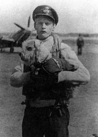 Bert Wolters en zijn mascotte